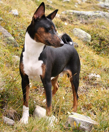 foto trovata on line sul sito danese di Pia Palmblad di un rarissimo caso di basenji tricolore /tigrato Tricolor Basenji